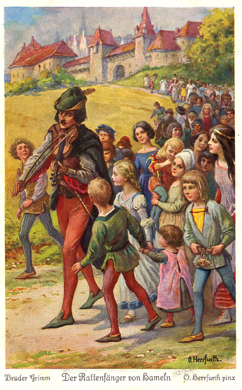 Der Rattenfänger nach Hameln. Postkartenserie nach dem Märchen der Brüder Grimm. Serie von sechs Postkarten der Firma Uvachrom, Gesellschaft für Farbenphotographie m.b.H., München - Stuttgart. Serie 242, Nr. 4393.